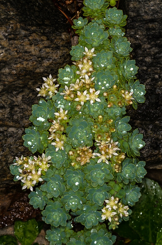 Rhodiola pachyclados im Alpengarten Mallnitz